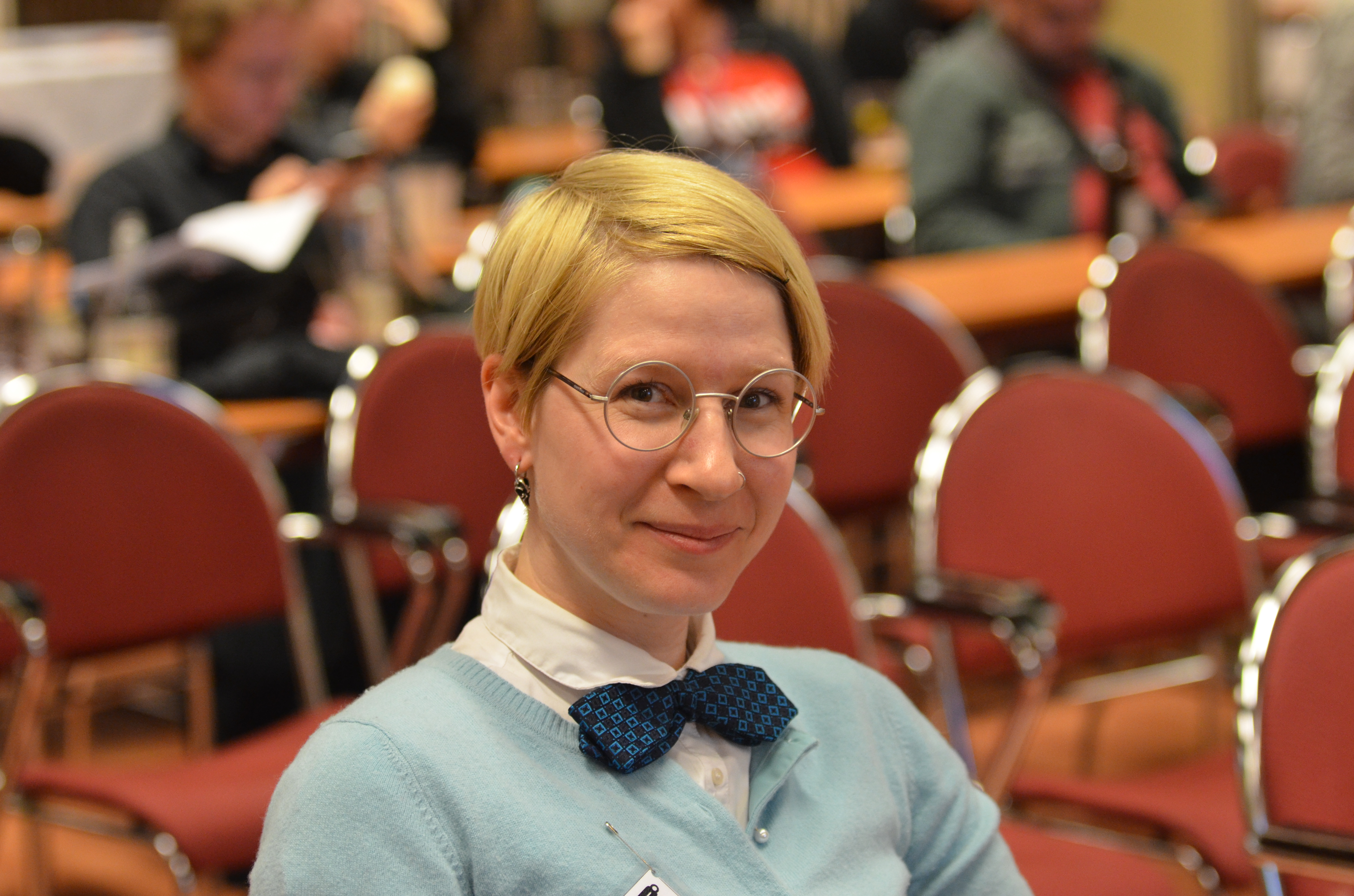 Fantasyförfattaren Nene Ormes på Åcon 5, 2012.